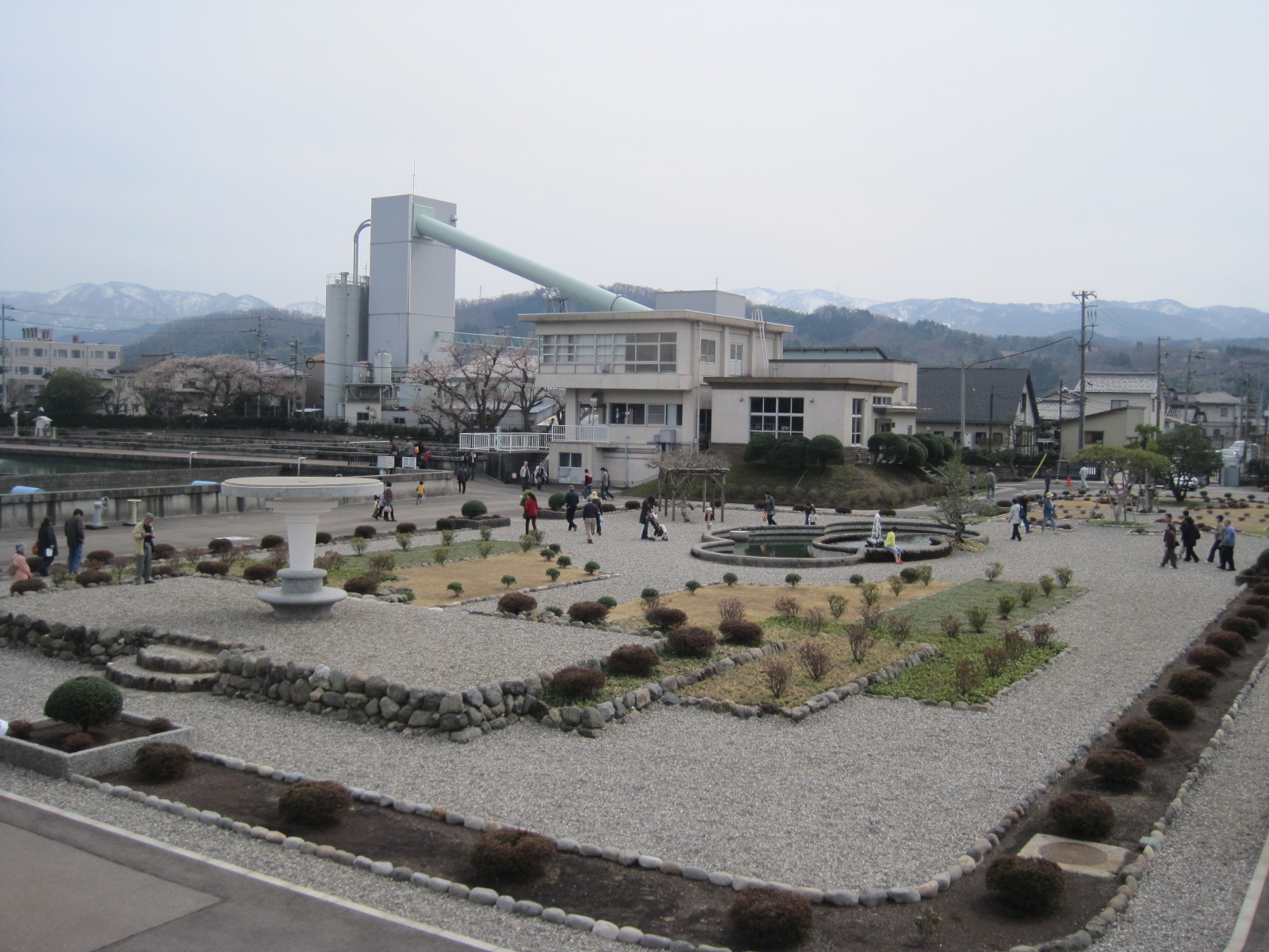 末浄水場園地前庭（一般開放時に撮影）